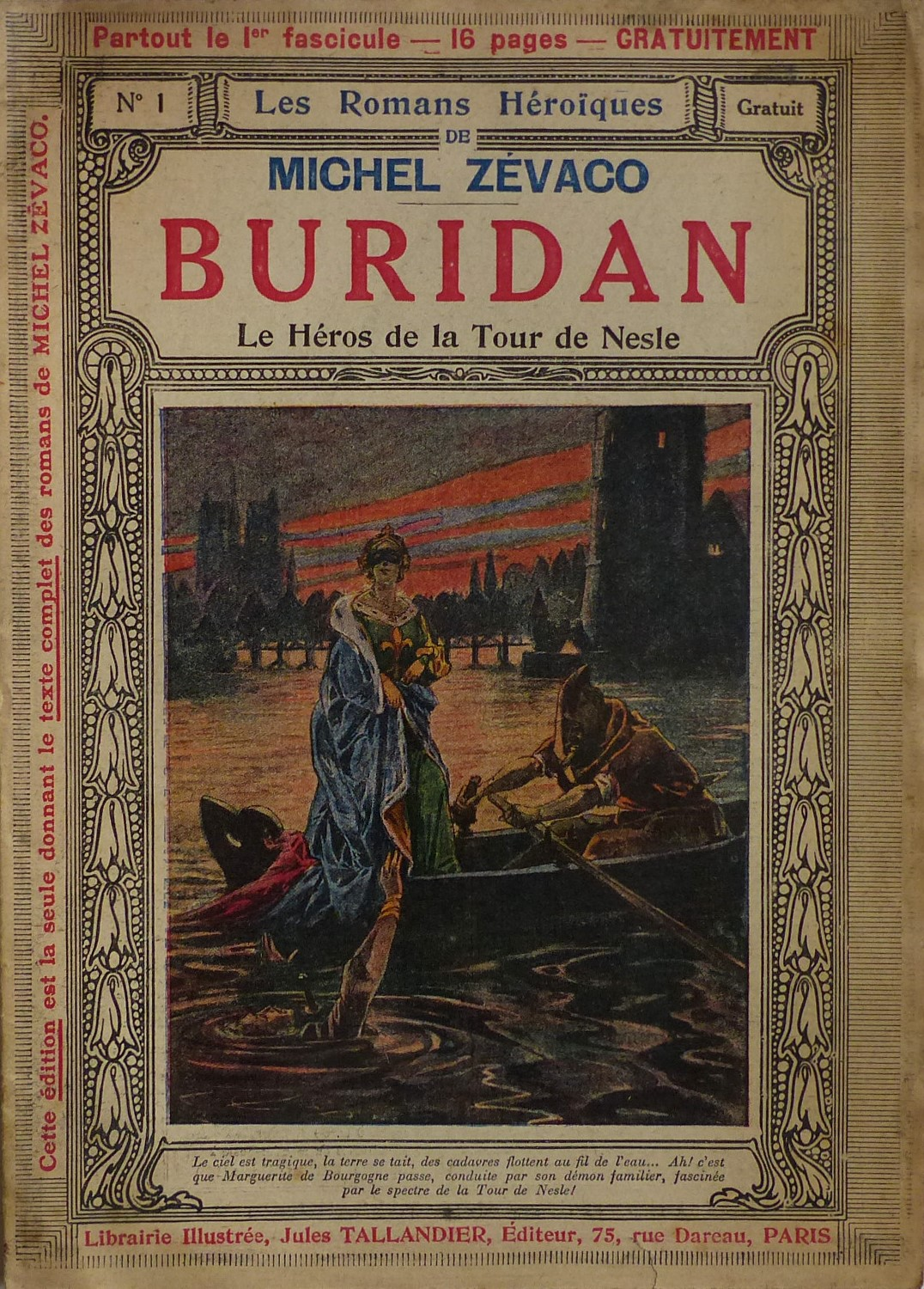 Couverture illustrée en couleur Auteur : Michel Zévaco Titre : Buridan, le héros de la tour de Nesle Editeur: Librairie Illustrée, Jules Tallandier Lieu d'édition: Paris Collection: Les Romans héroïques de Michel Zévaco Numéro dans la collection: 1 date : 1911 première publication en livraisons chez Tallandier, Les Romans héroïques